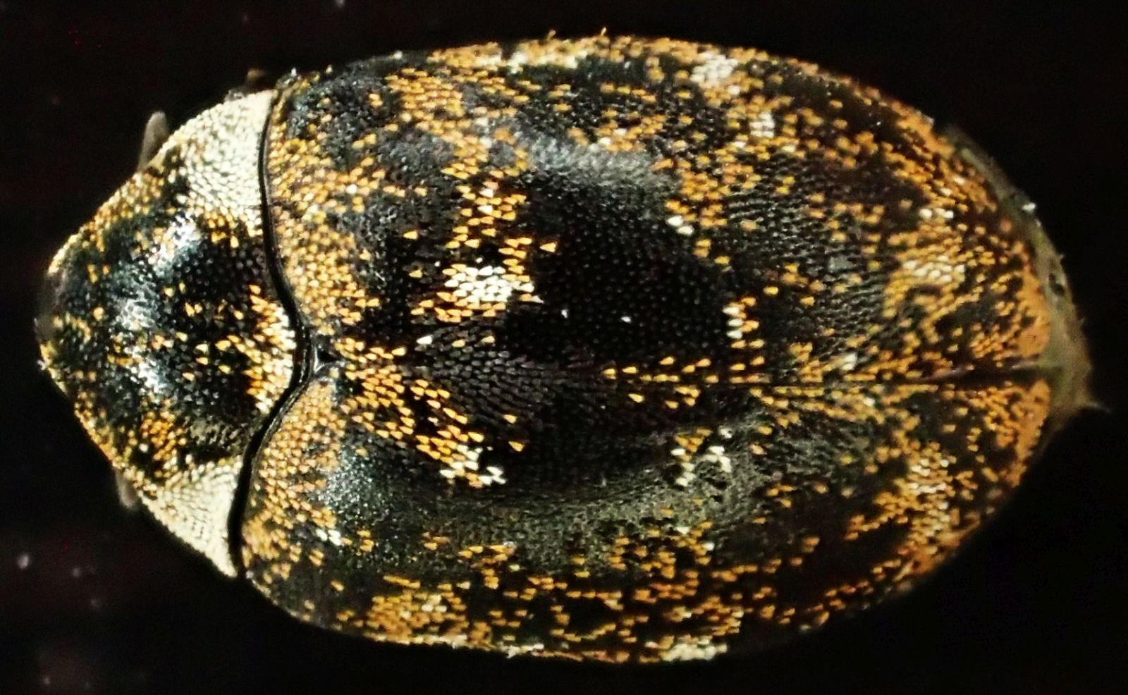 museumsbille